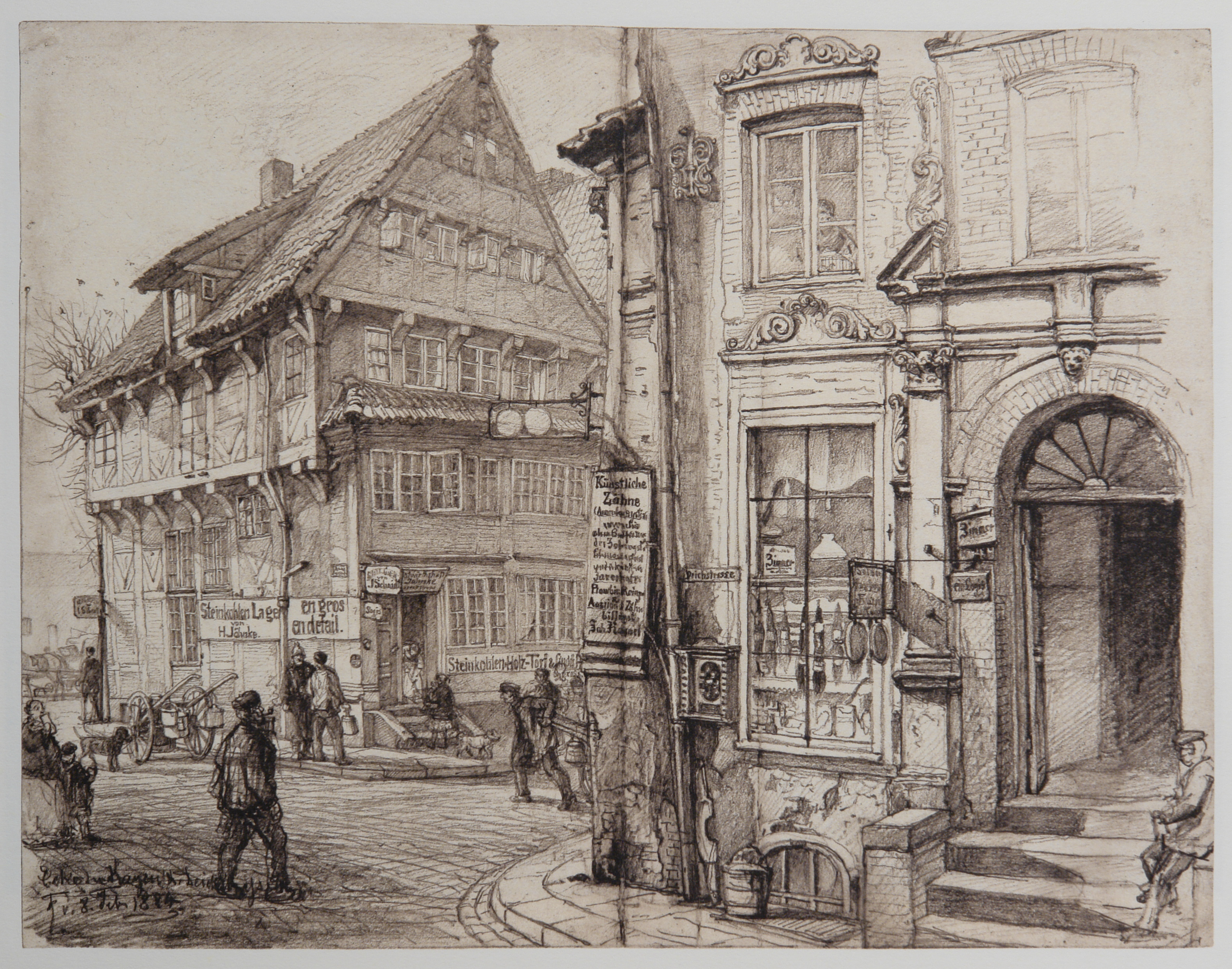 HAMBURG. Augenblicke einer Stadt 1882-1894. In 50 Zeichnungen von Johann Theobald Riefesell nach Originalen im Museum für Hamburgische Geschichte. Ecke-Kajen-Deichstrasse 08-02-1884